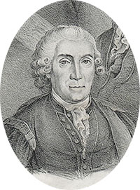 Eberhard Rosenblad (1714-1796)